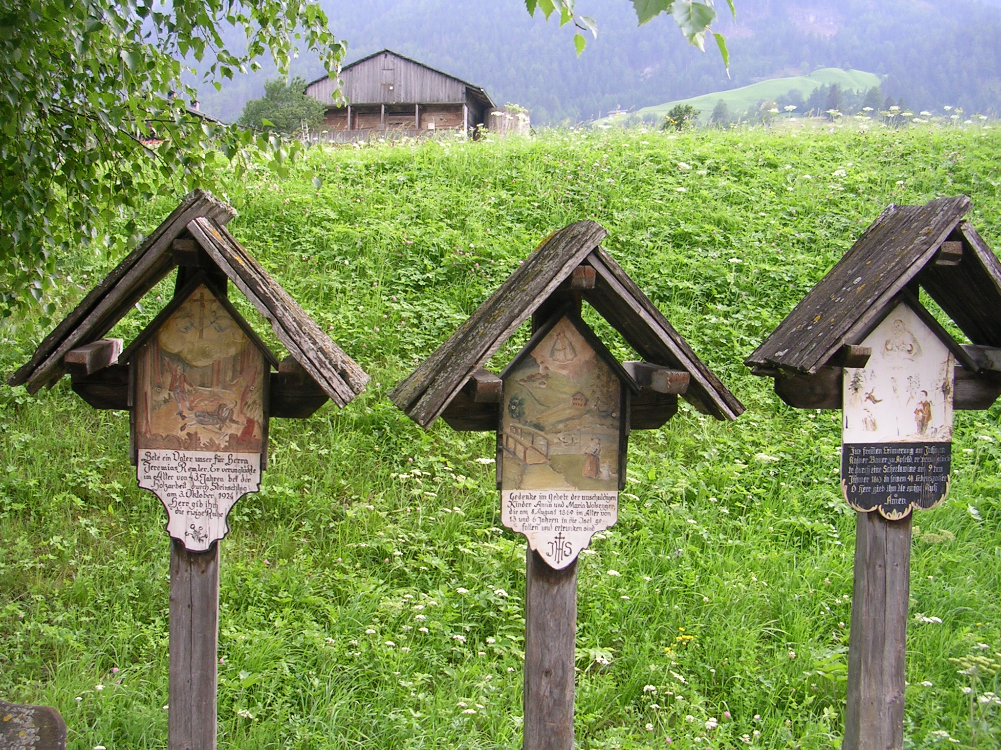 Drei Votivtafeln an der Iselbrücke in der Fraktion Ganz (Gemeinde Matrei in Osttirol)